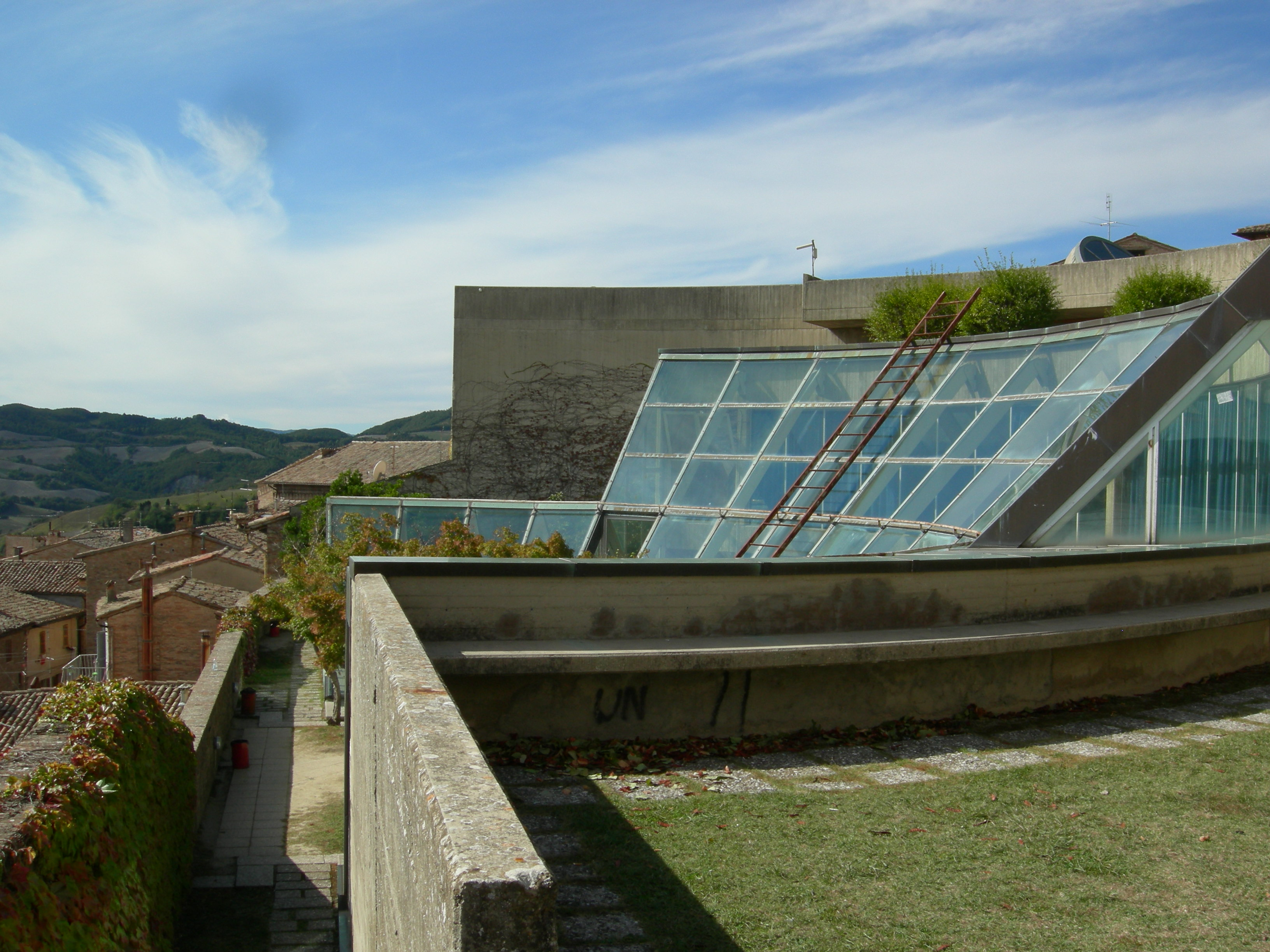 Terrazze-Giardino del Nuovo Magistero di De Carlo in Urbino